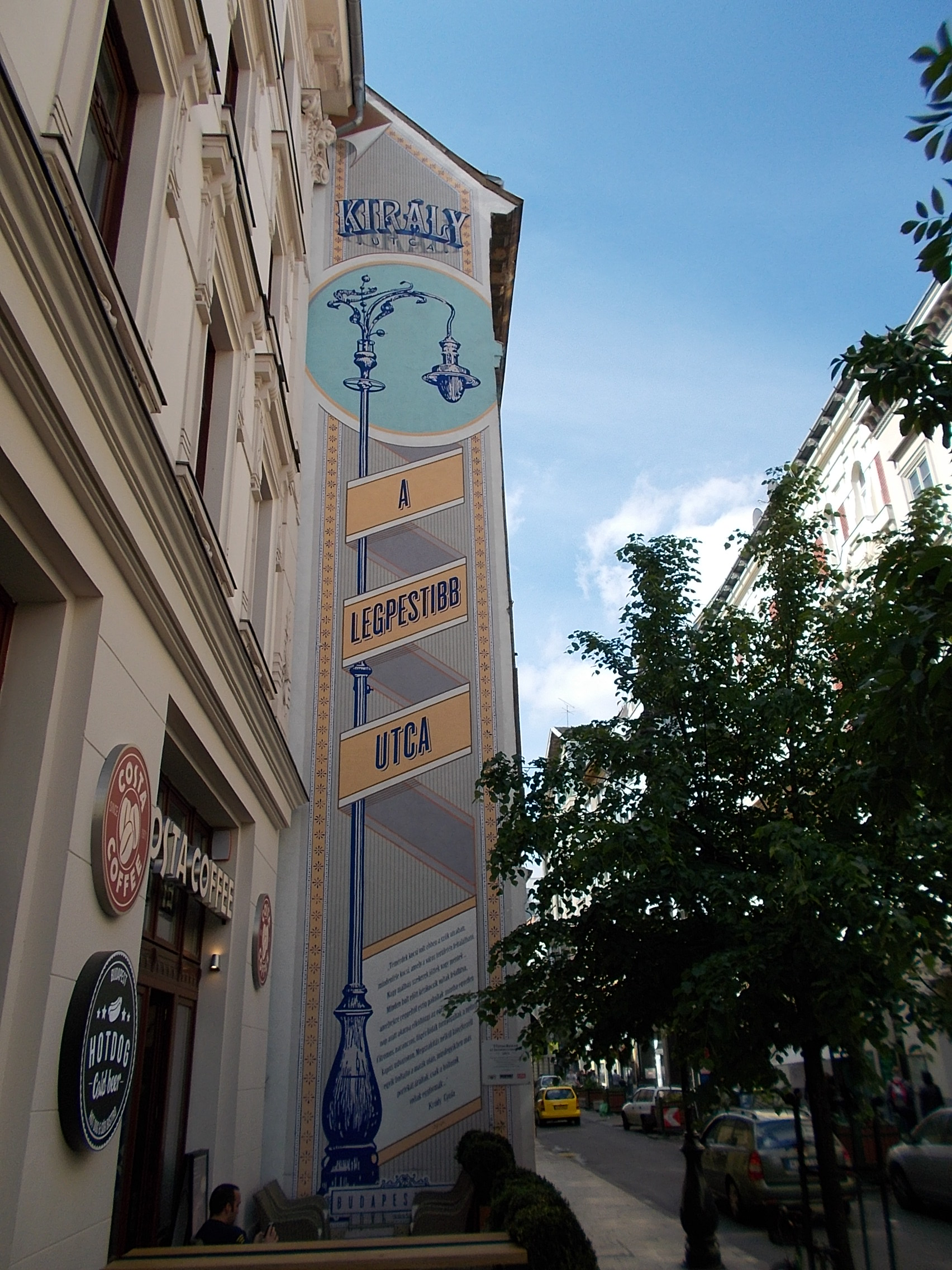 Gozsdu-udvar mellett a falon Király a legpestibb utca (tűz)falfestés - Magyarország, Budapest, Erzsébetváros, Király utca, kb. 13